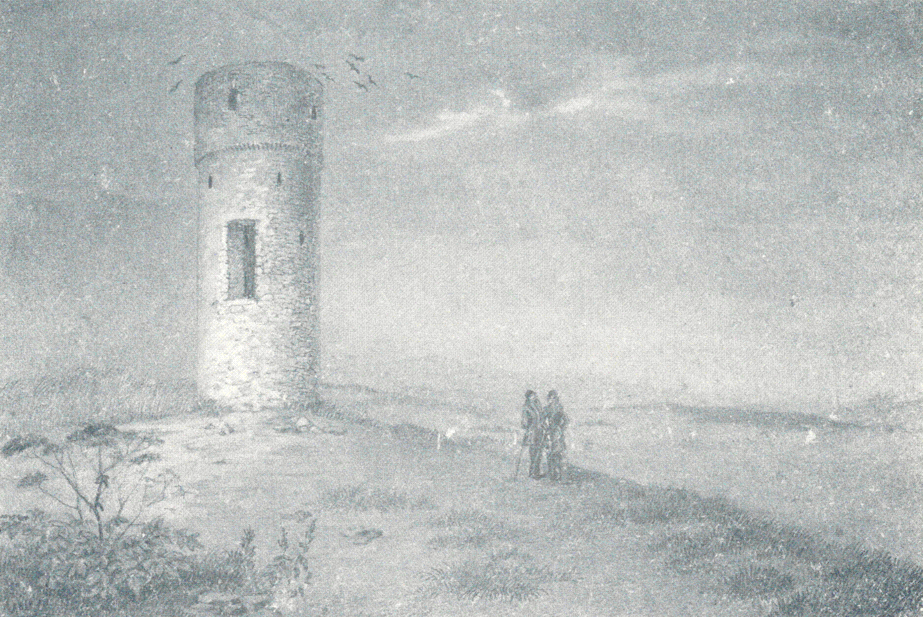 Wartturm von Hof, Zeichnung von Georg Könitzer